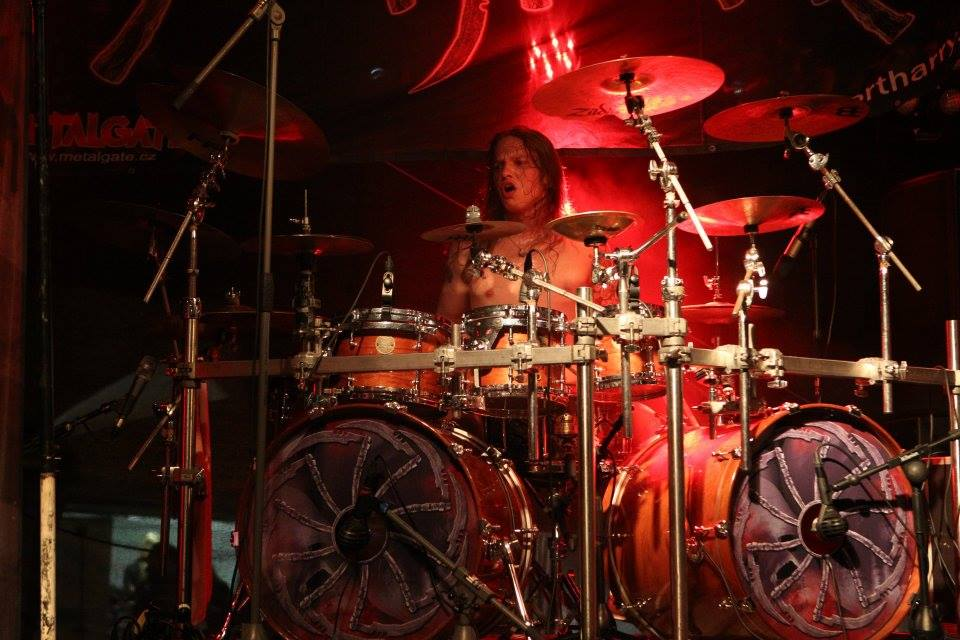 Jiří Rosa - drums of Tortharry